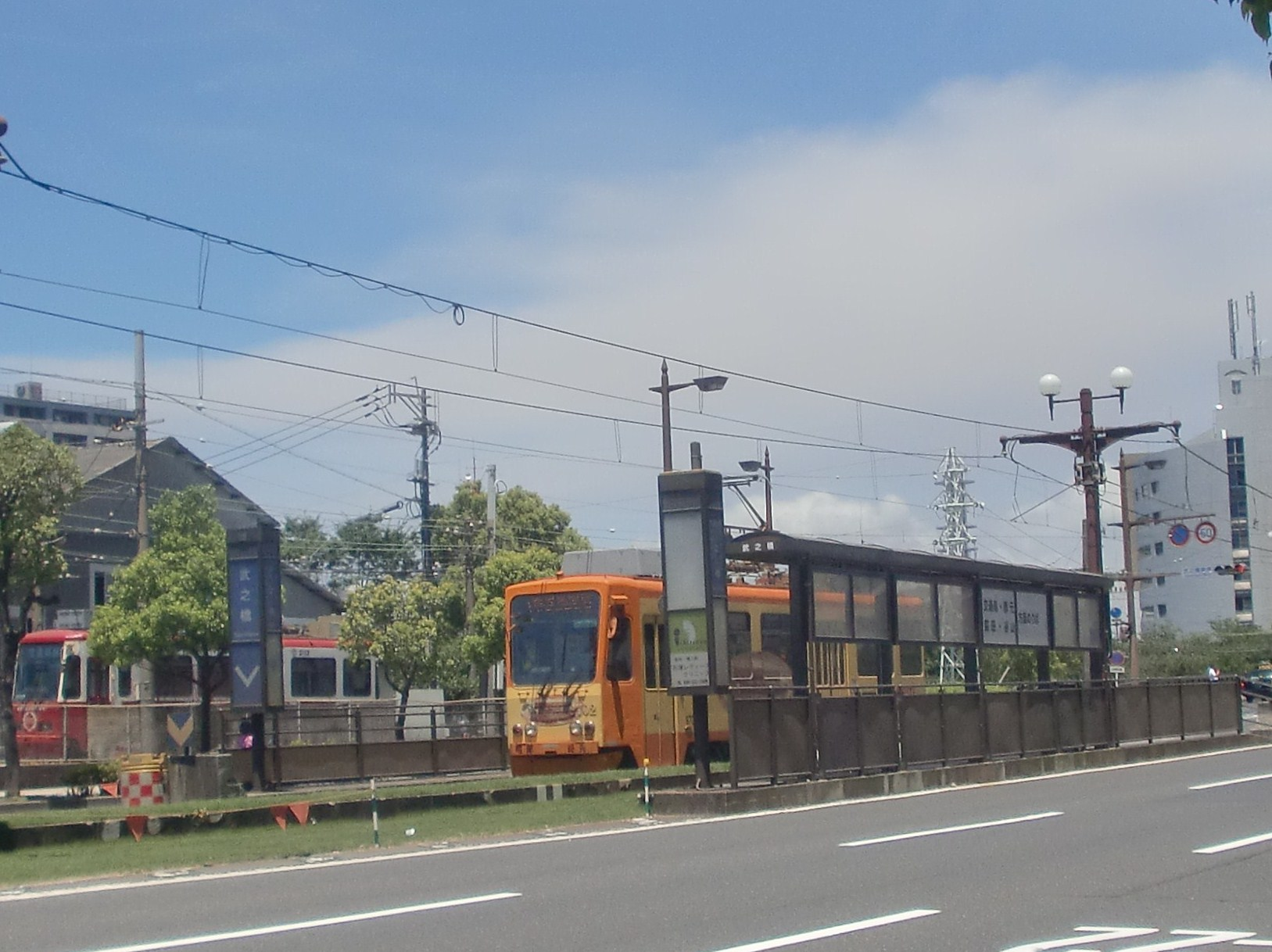 武之橋駅の外観